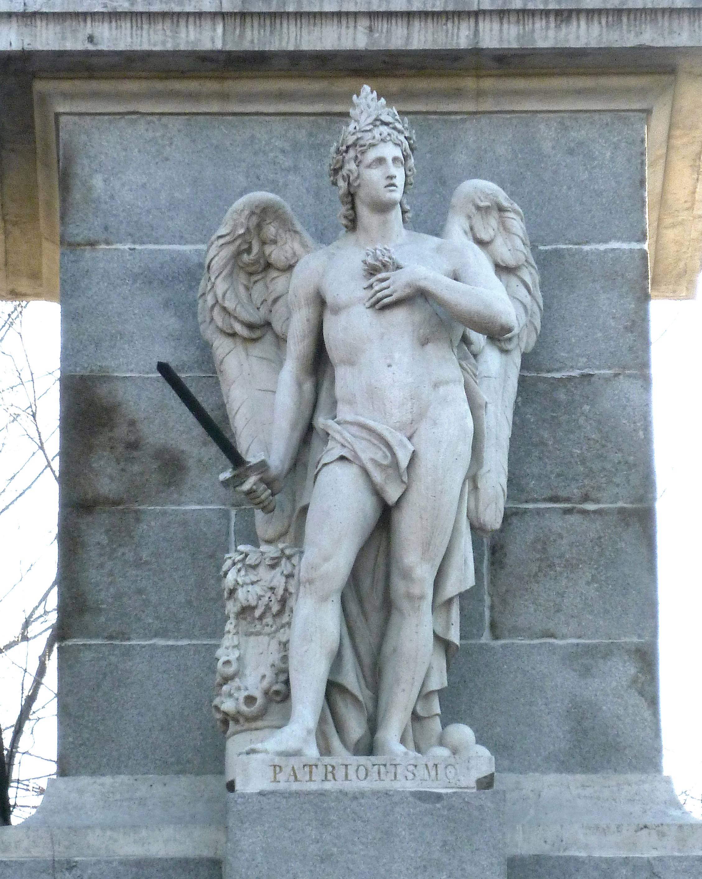 Allegory